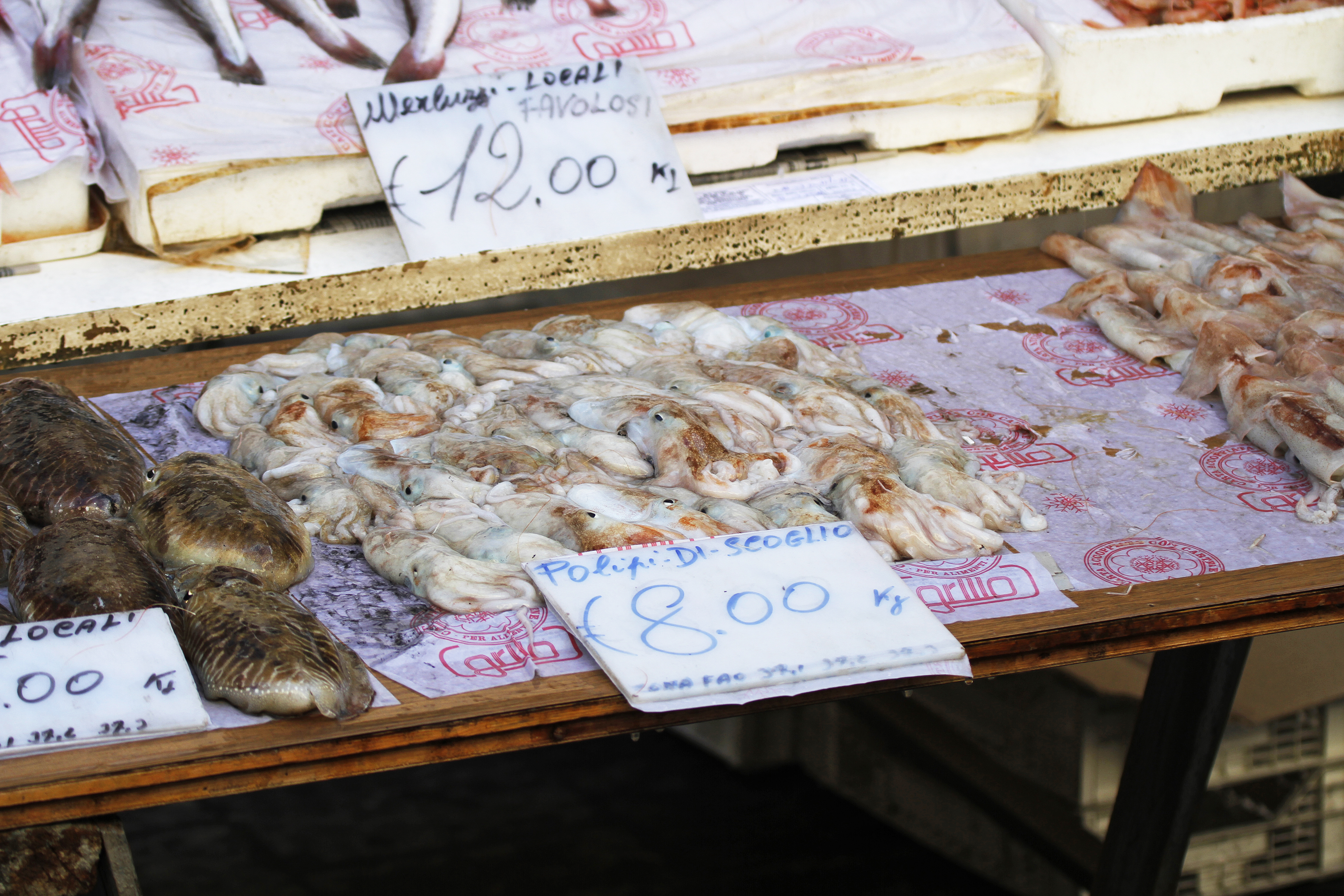 Seppie, polpi e totani locali (mercato di Siracusa)